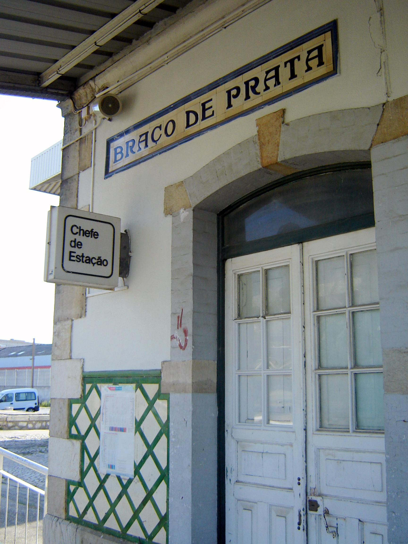 Edifício principal da Estação ferroviária de Braço de Prata